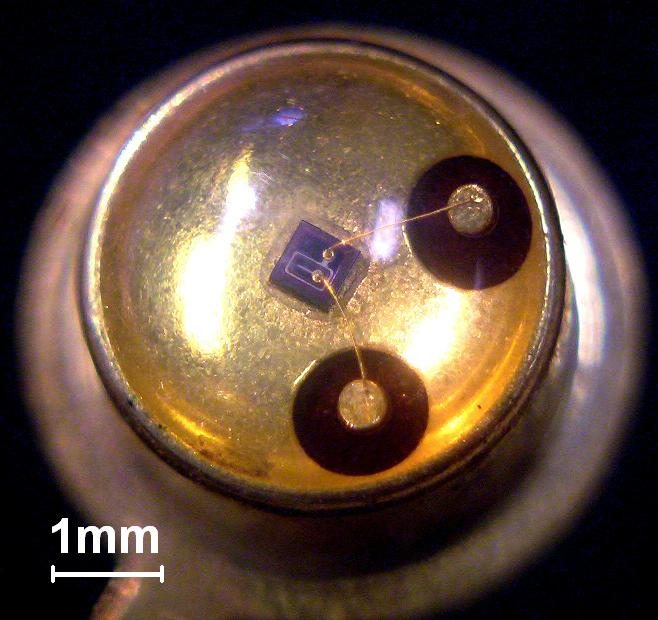 Fototransistor mit herausgeführtem Basisanschluss (Ringstruktur, Bonddraht nach rechts). Der Emitteranschluss geht nach unten, der Kollektoranschluss entsteht durch die Montage auf dem Gehäuseboden. andere Versionen